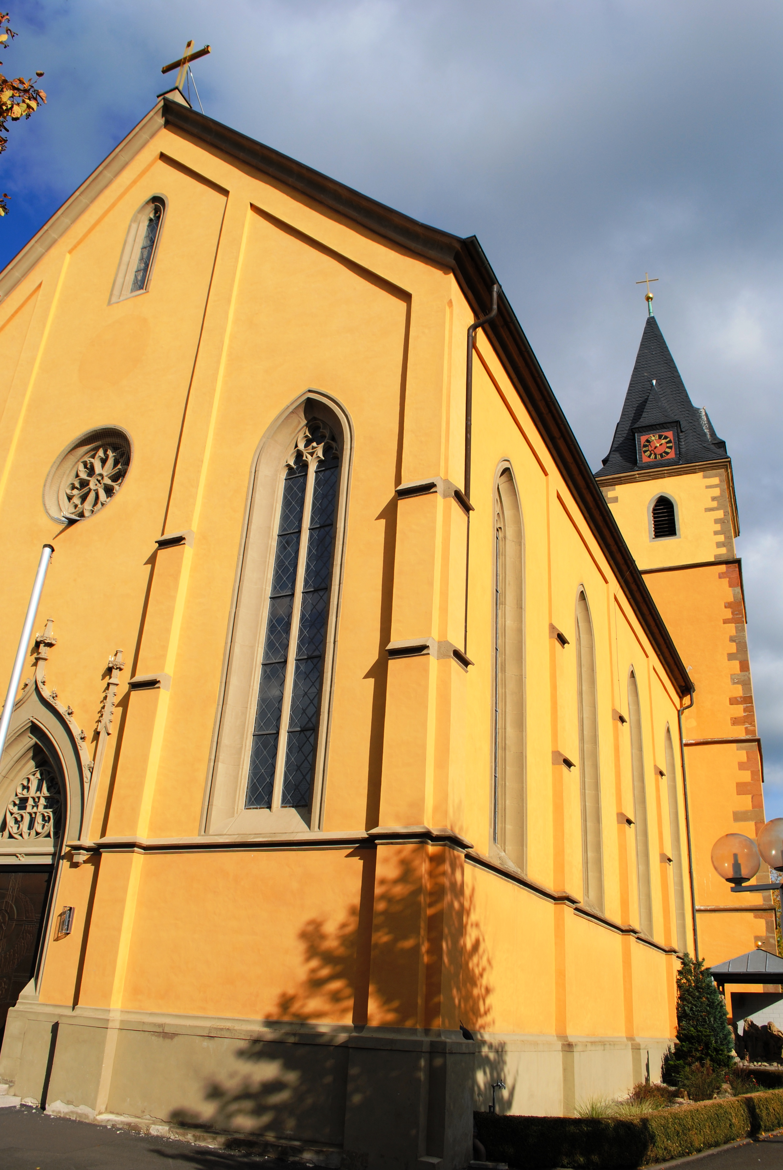 Kirche Heiligkreuz, Kirchgasse 8, Schwarzach-Stadtschwarzach, Saalbau mit eingezogenem Chor und südlich anschließendem Turm, Chor, 1467, Turm, 1424, das Obergeschoss, 1614, Langhaus neugotisch, 1868; D-6-75-165-48